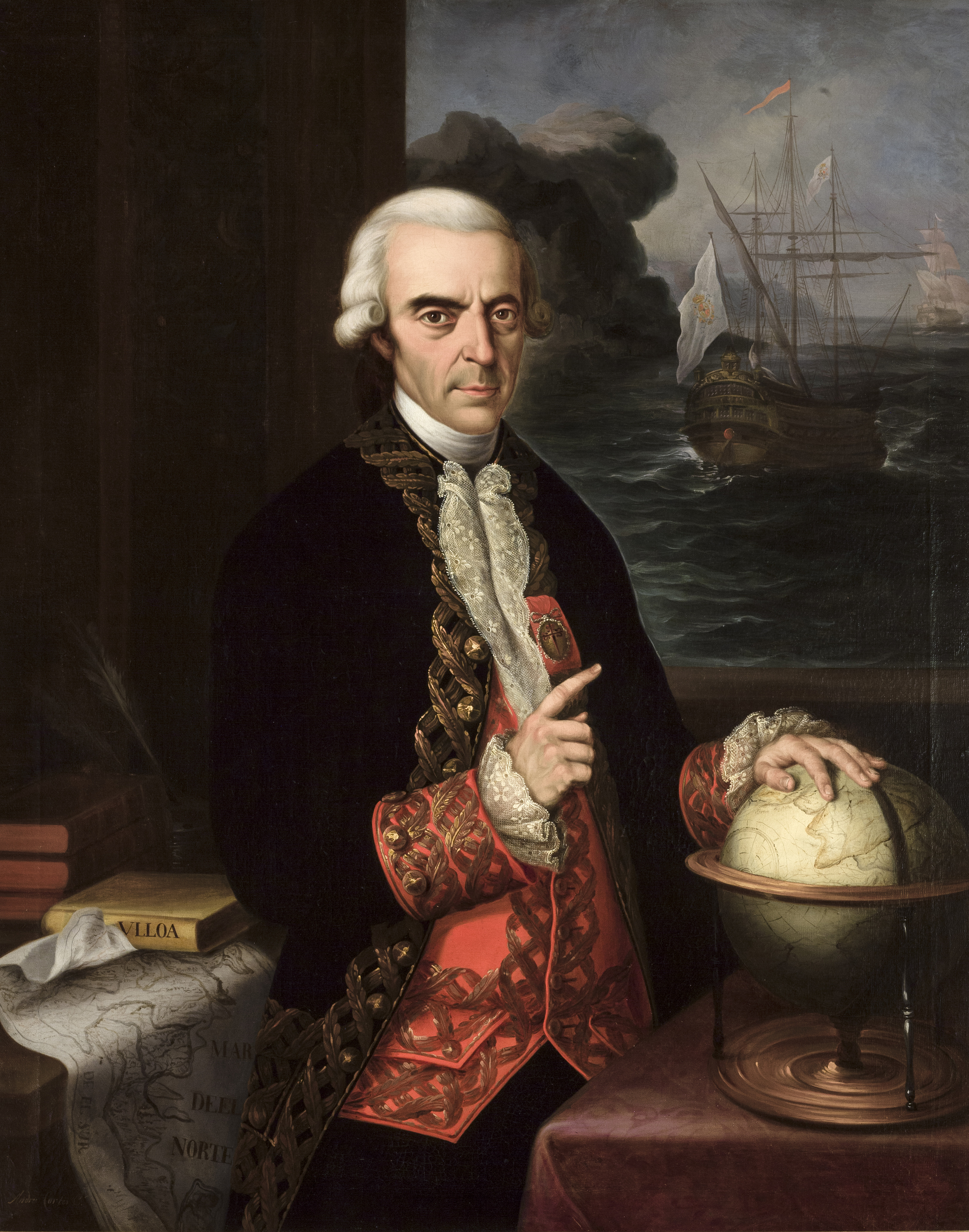 Retrato del marino, naturalista y escritor español Antonio de Ulloa (1716-1795), que llegó a ser almirante de la Real Armada Española y comendador de Ocaña en la Orden de Santiago. Esta obra fue donada en 1898 al Ayuntamiento de Sevilla por la infanta María Luisa Fernanda de Borbón, que era hija del rey Fernando VII de España, y procedía de la Galería del Palacio de San Telmo, que era propiedad en esa época de la infanta y de su esposo, el duque Antonio de Orleans.